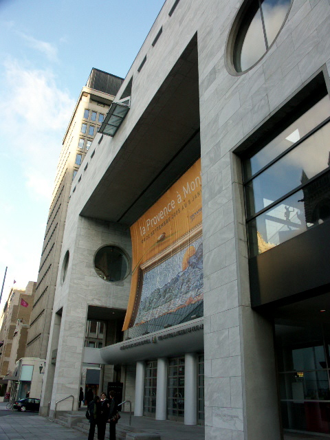 Musée des beaux-arts de Montréal, building from 1991, Montreal. Photo by: user:gene.arboit